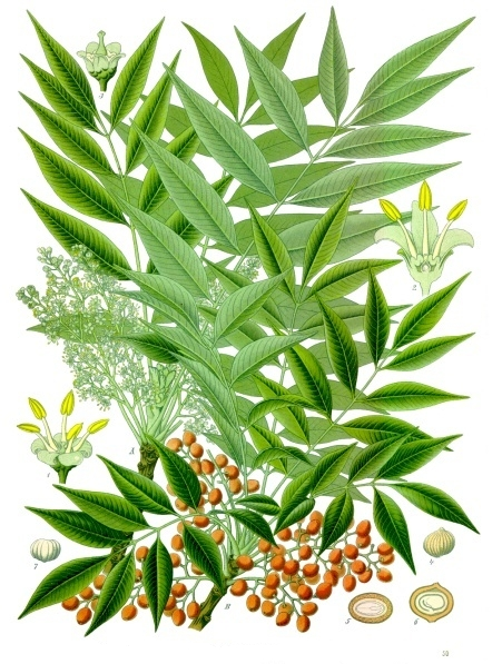 Gewürzsumach. A Blütenzweig; B Fruchtzweig; 1 Blüte; 2 dieselbe im Längsschnitt; 3 Kelch mit Diskus und Pistill; 4 Frucht nach Entfernung des Exocarps; 5 Frucht im Querschnitt; 6 Frucht im Längsschnitt; 7 Samen.